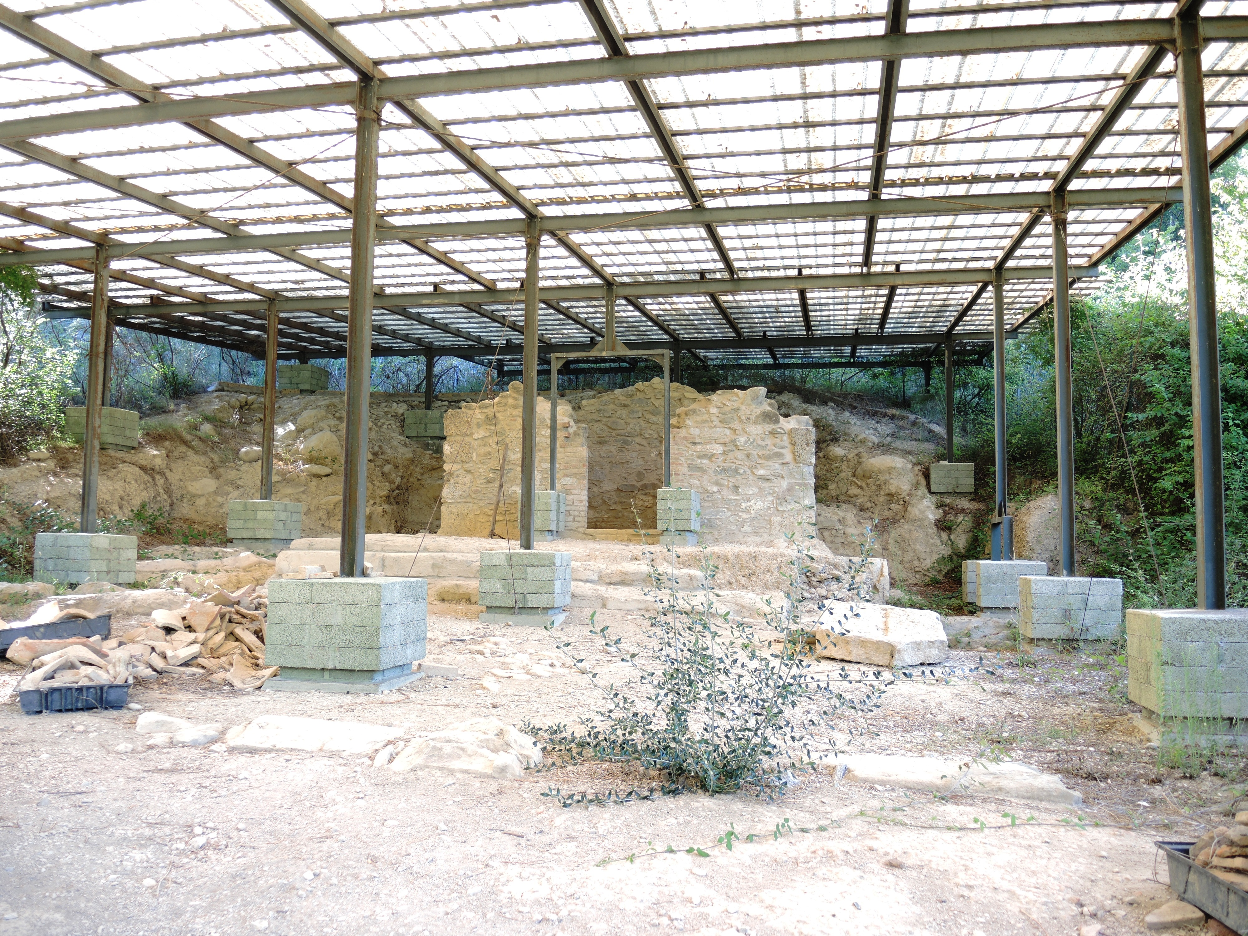 Montorio al Vomano: Tempio di Ercole